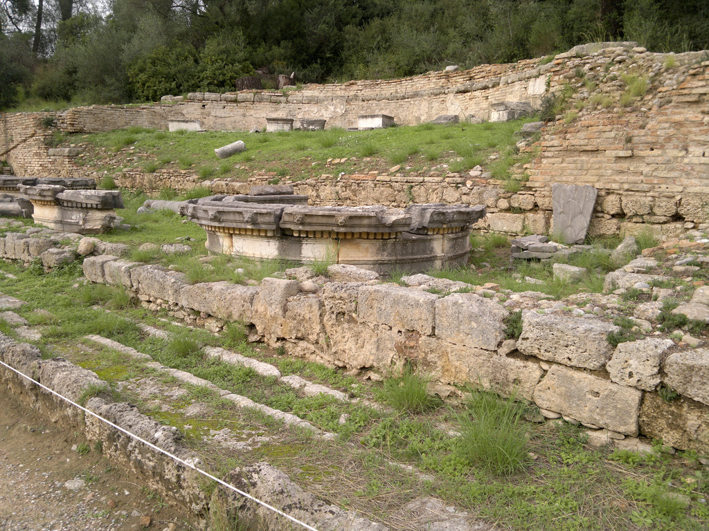 Ancient Olympia, Greece. Photo taken with Nokia N8 (12 Megapixel). Αρχαία Ολυμπία. Φωτογραφία που τράβηξα με το Nokia N8.